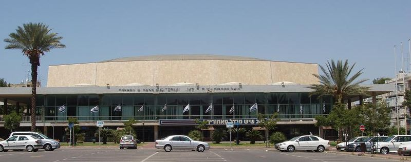 היכל התרבות, תל אביב. צילם דוד שי